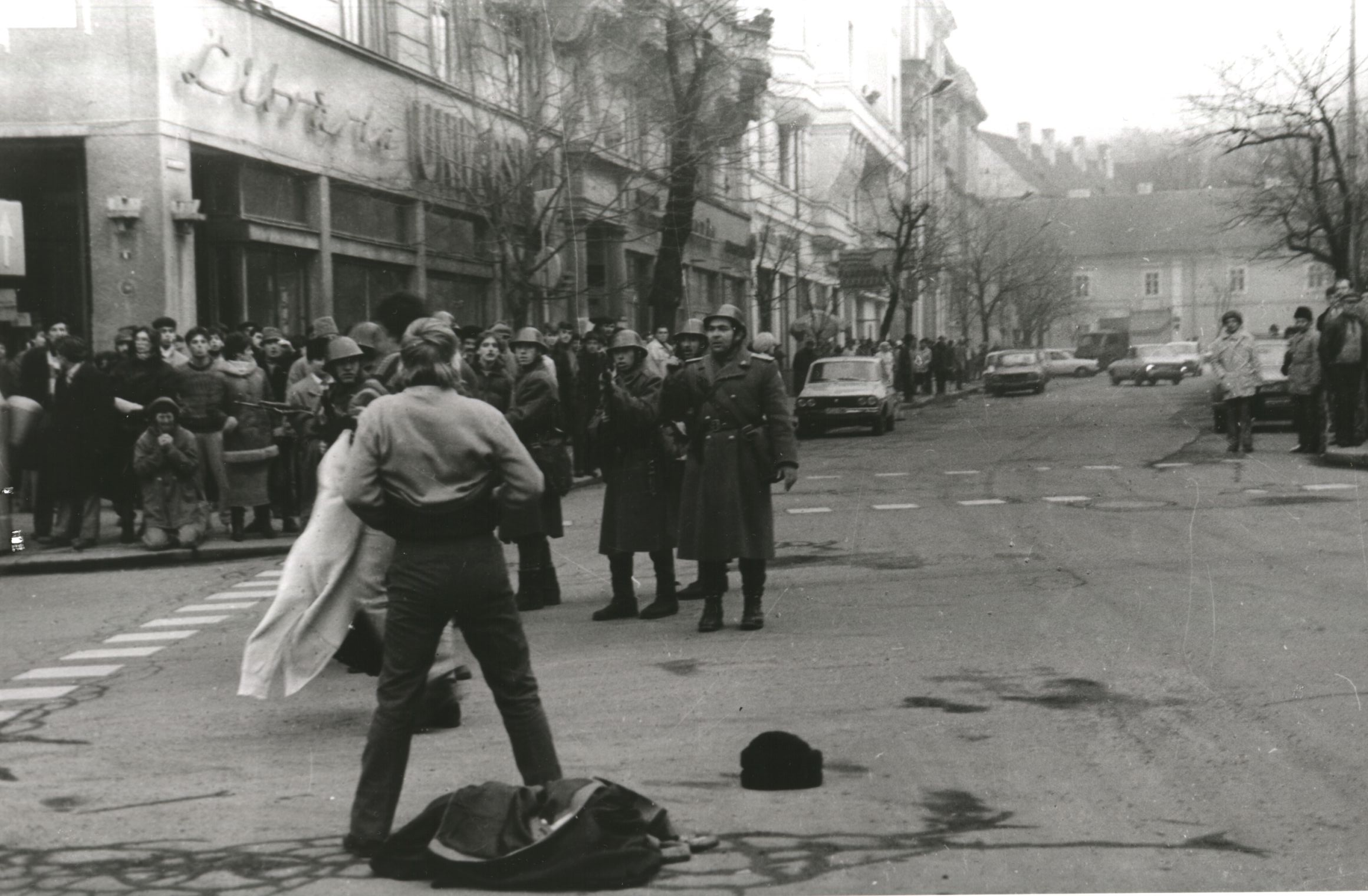 Această poză a fost realizată de către Răzvan Rotta în zilele revoluţiei din 1989. Cătălin Bogdan a cerut acestuia să transmită în domeniu public cele 21 de poze iar dânsul şi-a dat acordul; ulterior acest acord de publicare a fost trimis confirmat către d-nul Rotta, pe data de 5 aprilie 2010, la adresa - vezi tichetul 2010032110014341)